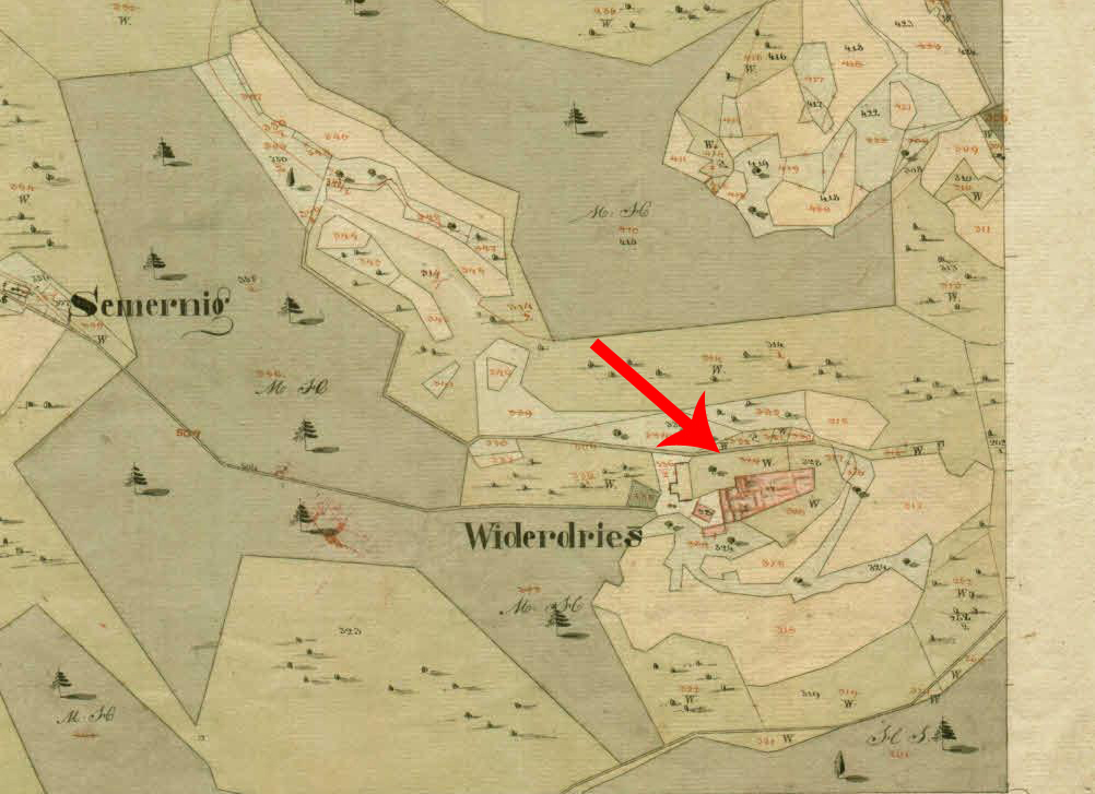 Franciscejski kataster za Štajersko, 1823-1869